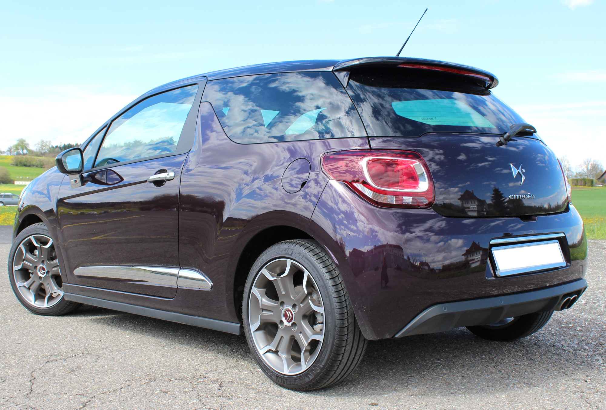 1.6 THP 165 Stop&Start 6-Gang-Manuell.